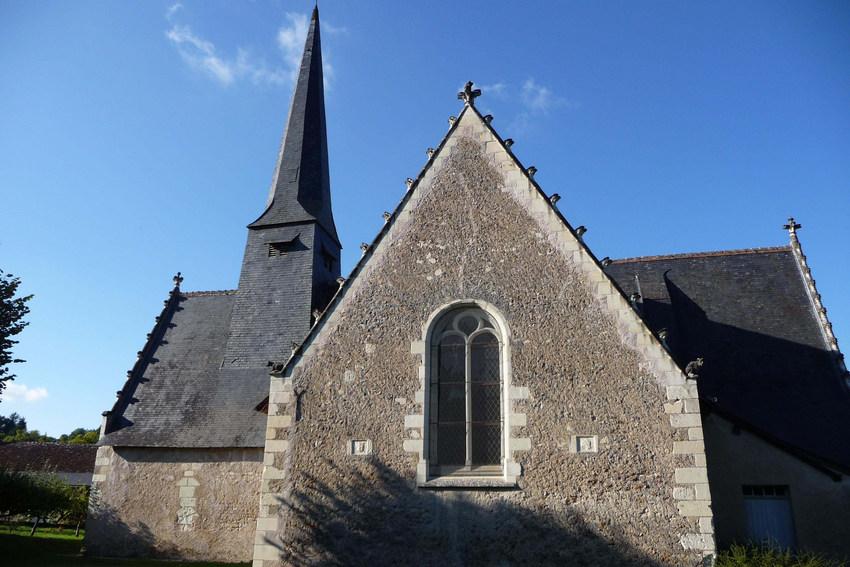 Eglise du vieux bourg de saint etienne de chigny